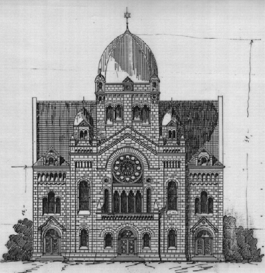 Synagoge in Osnabrück, Fassadenansicht 1905